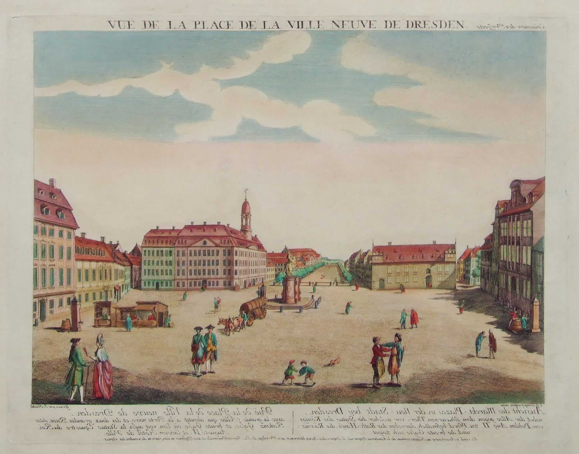 Dresden, zurückgespiegeltes (jedoch perspektivisch nicht korrigiertes) Guckkastenbild des Neustädter Markts („Ansicht des Marckt=Plazes in der Neu=Stadt beij Dresden“), Motivmaß 35,8 cm × 26,5 cm